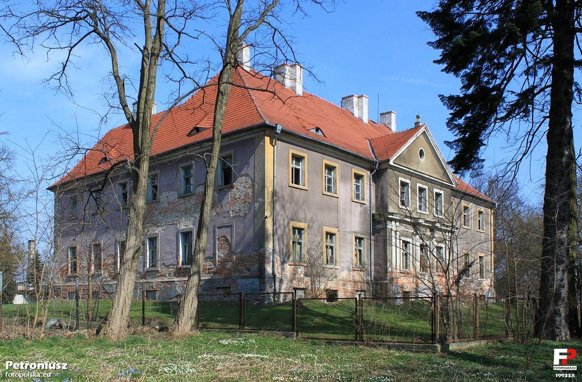 Pałac w Kargowej. Na pierwszym planie dawny przypałacowy ogród.